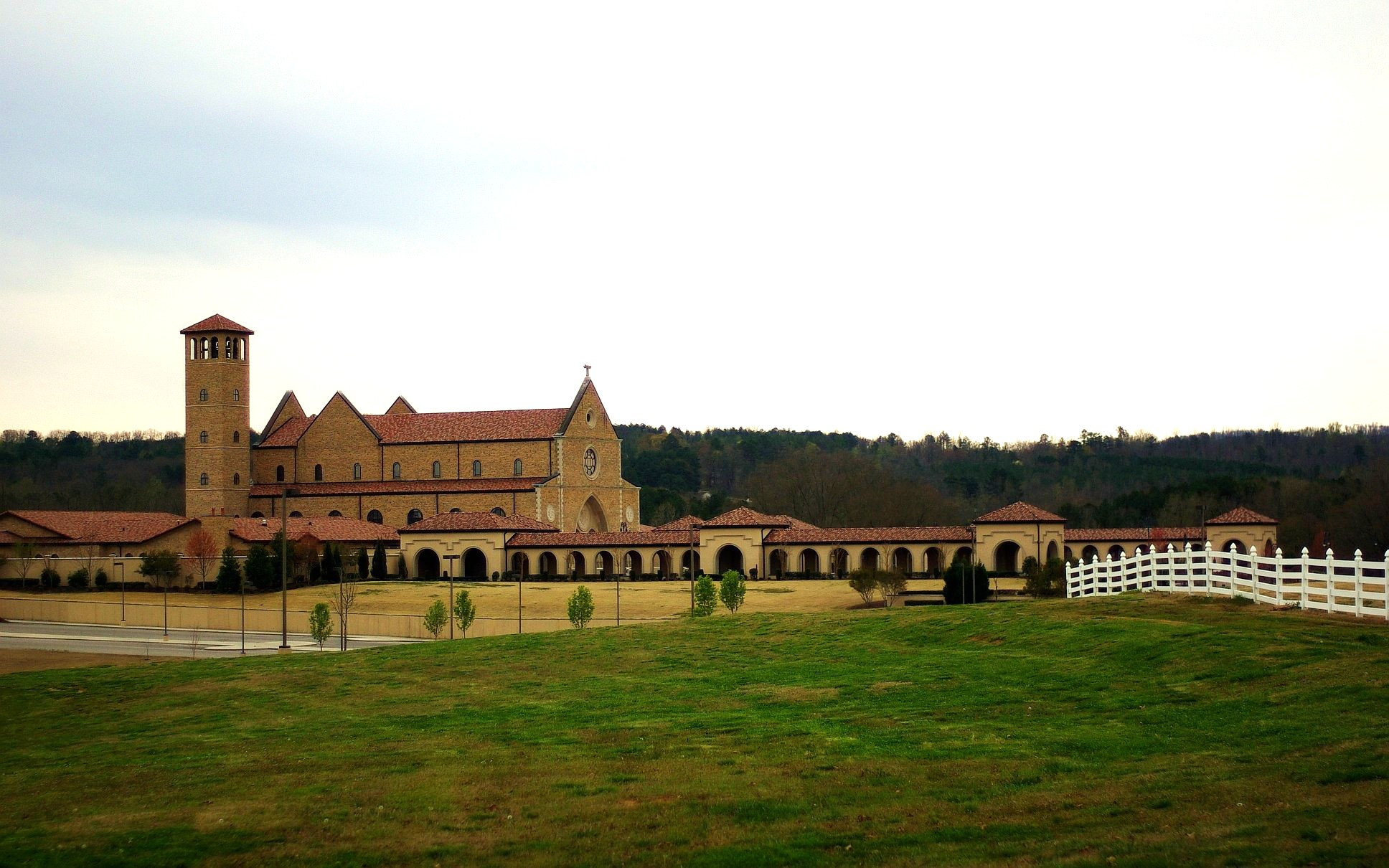 shrine